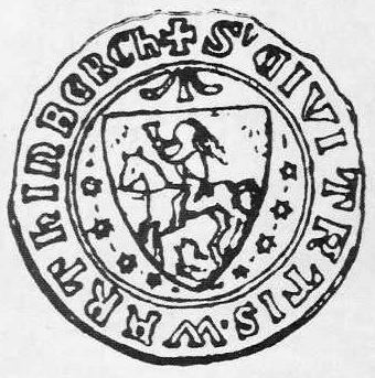 Najstarsza zachowana pieczęć miejska Sycowa (1377)